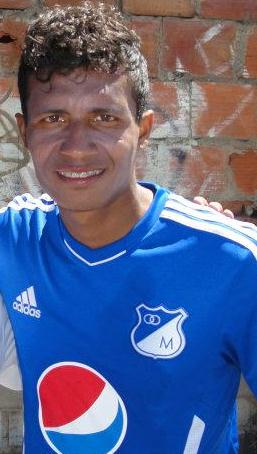 Luis Mosquera con la camiseta de Millonarios F.C